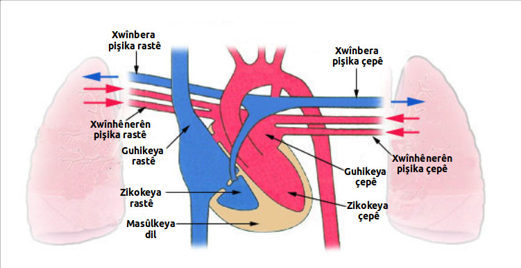 KurdishːGera xwînê ya navbera dil û pişikan wekî gera pişikan bi nav dibe. Xwîna kêmoksîjenî bi navbeynkariya gera pişikan, di mûlûleyên pişikan de oksîjena xwe zêde dike û karbona dîoksîda xwe jî kêm dike, bi vî awayê xwîna têroksîjenî vedigere dil.